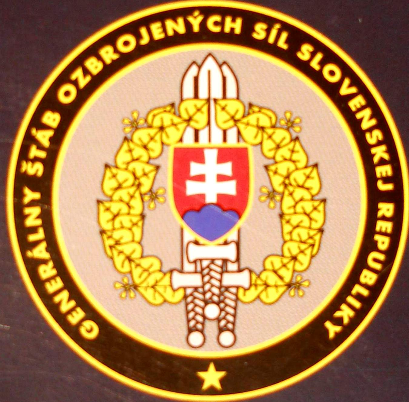 reprodukcia: znak Generálneho štábu ozbrojených síl Slovenskej republiky